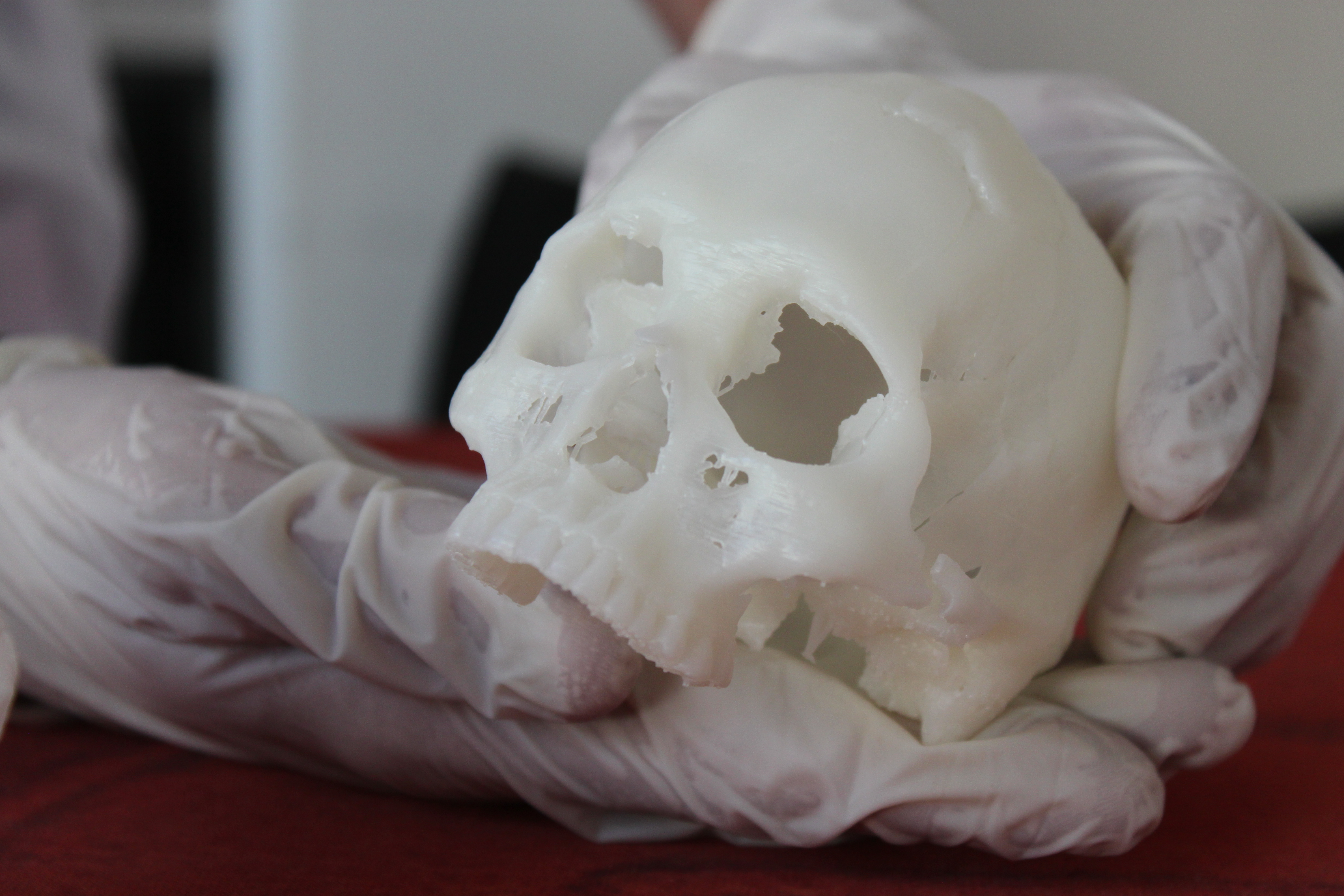 Lapa do Santo - Educativo - Exposição 'Morte e vida na Lapa do Santo' no Centro de Arqueologia Annette Laming-Emperaire, coordenado pela arqueóloga Rosângela Albano e Cleito Ribeiro, no município de Lagoa Santa, Minas Gerais. Sob curadoria de André Strauss e Rodrigo Elias de Oliveira essa exposição é a primeira a mostrar ao grande público o material arqueológico encontrado na Lapa do Santo. Um destaque é que a exposição terá inúmeras peças produzidas através de impressão 3D. Também fará parte da exposição maquetes táteis e fotos do renomado Maurício de Paiva. Nesta imagem observa-se um crânio da Lapa do Santo impresso em escala reduzida.